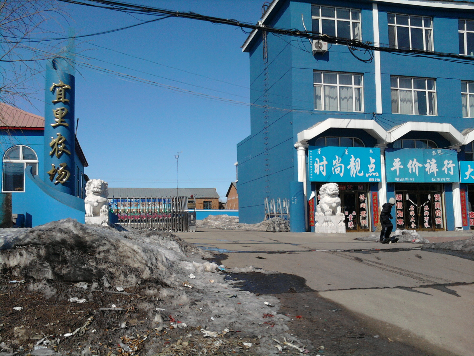 宜里农场